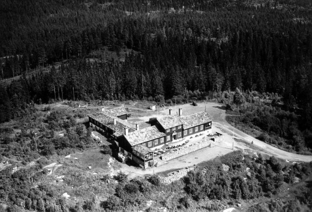 Grefsenkollen restaurant på toppen av Grefsenkollen, 1954